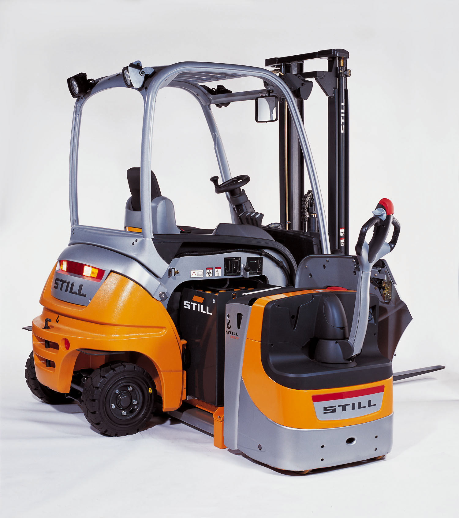 Seitlicher Batteriewechsel an einem Still Gabelstapler.